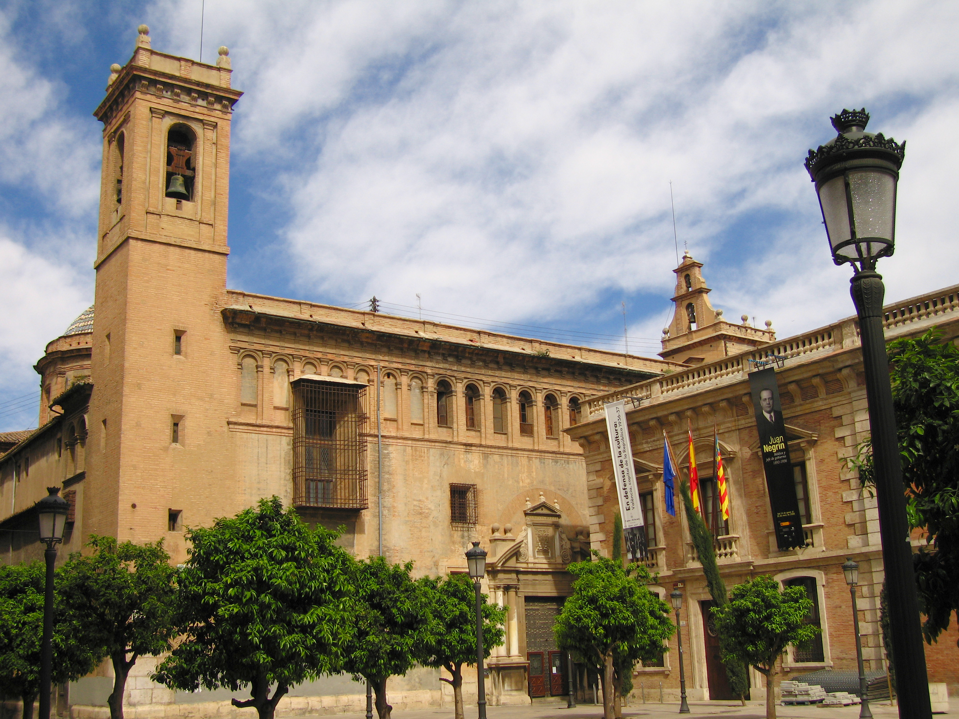 Façana del Patriarca de València